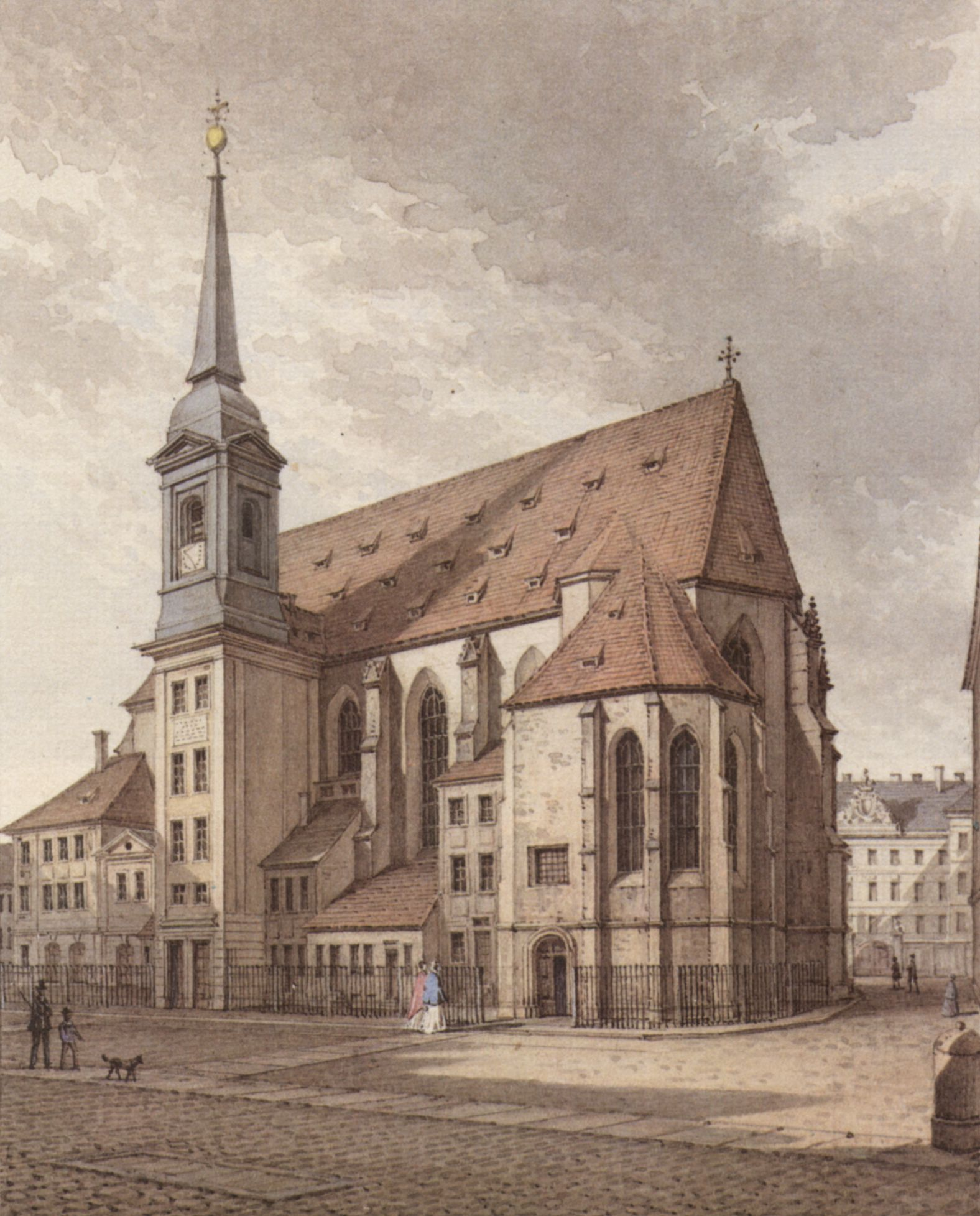 Sophienkirche